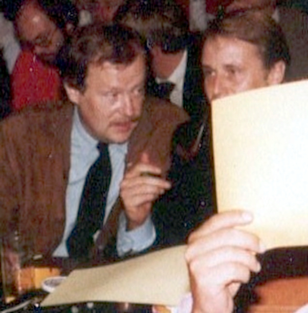 Pressesprecher Bissinger berät Hamburgs Bürgermeister Klose